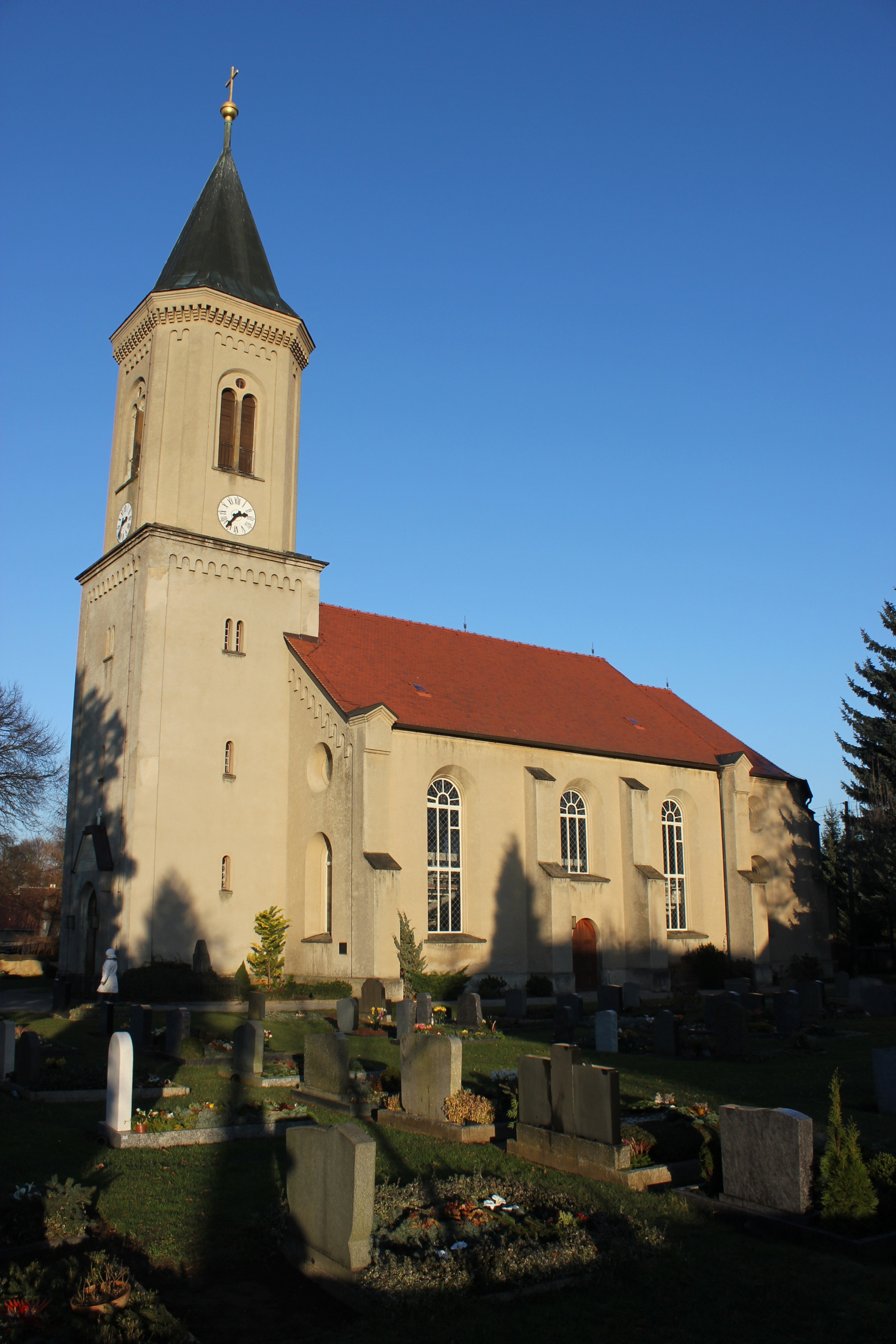 Hornjoserbsce: Ewangelska cyrkej w Minakale (gmejna Radwor).